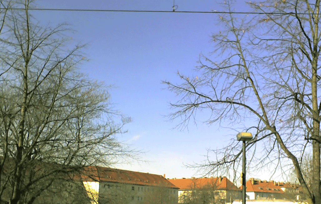 Himmelblau eines Nordhimmels im Februar fast mittags